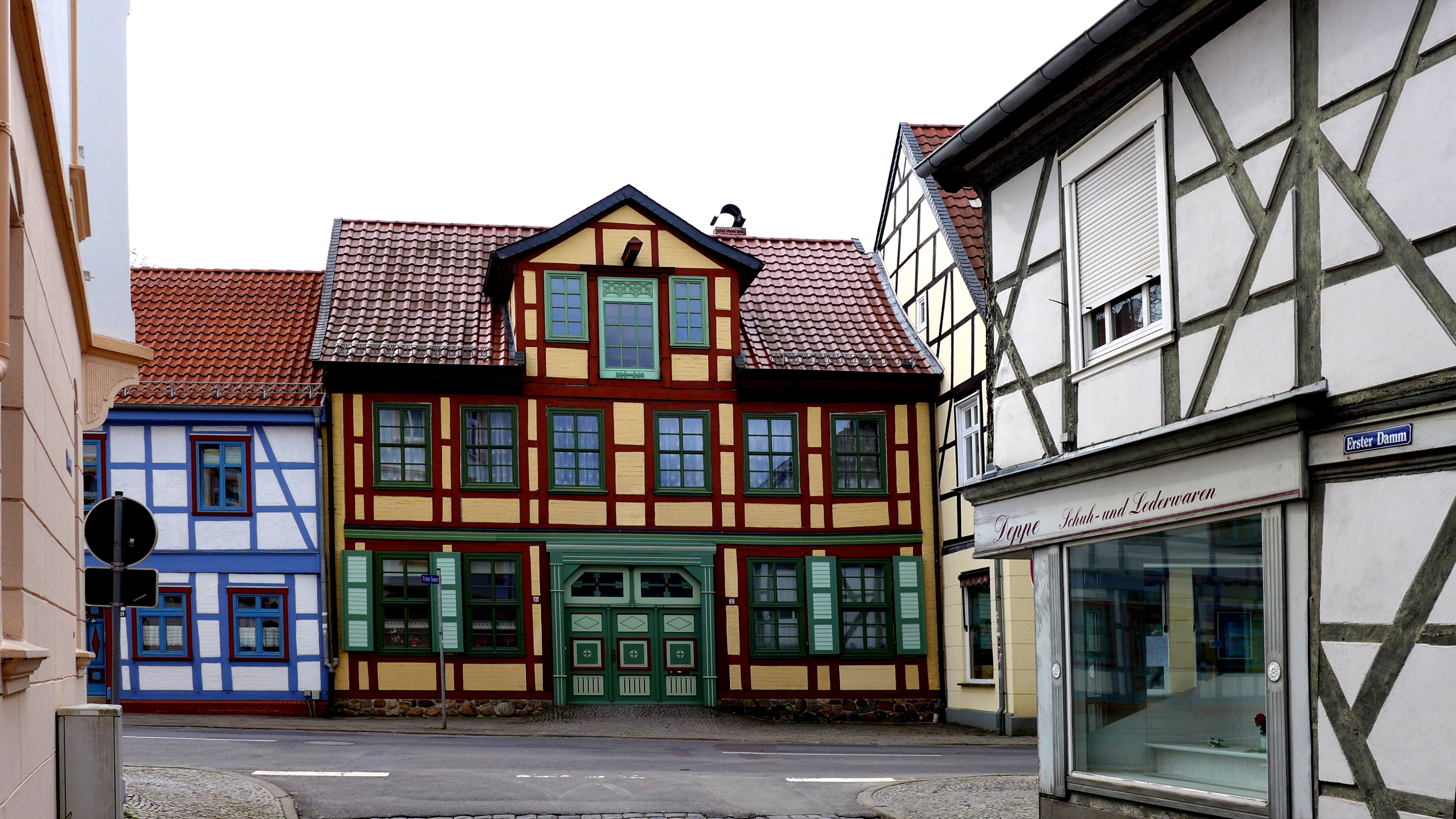 Als Wohnhaus genutztes und als Baudenkmal gelistetes Fachwerkhaus (Bildmitte)in der Holzmarktstraße 21 von Salzwedel. Aufnahmedatum 2016-03.